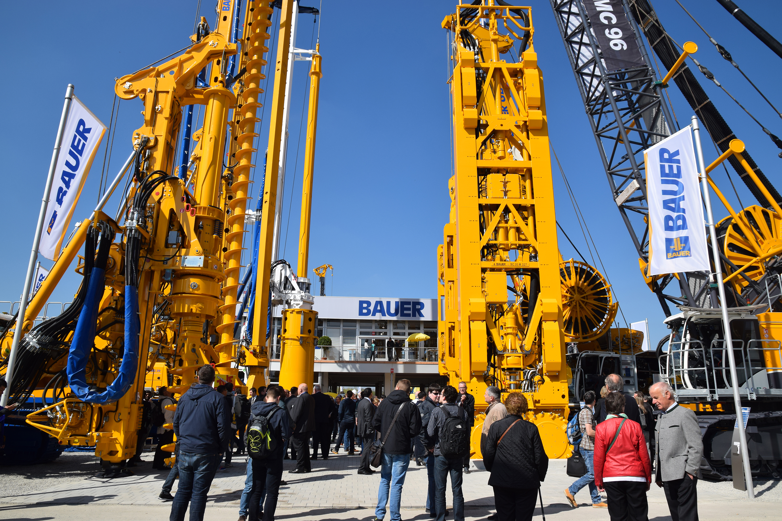 Die BAUER Maschinen Gruppe auf der weltweit bedeutendsten Fachmesse für Baumaschinen, der bauma in München.